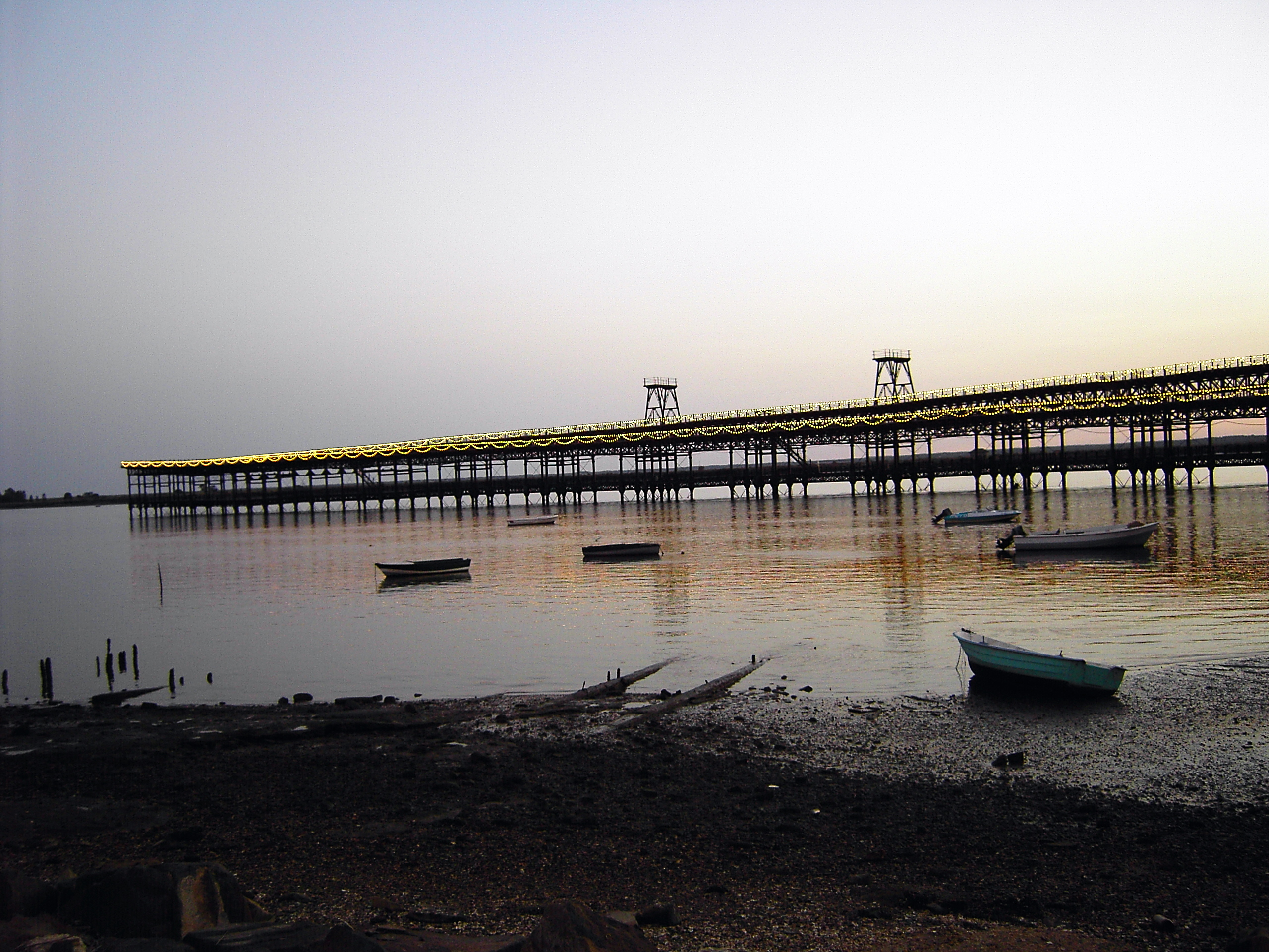 Muelle del Tinto (Huelva) en Colombinas